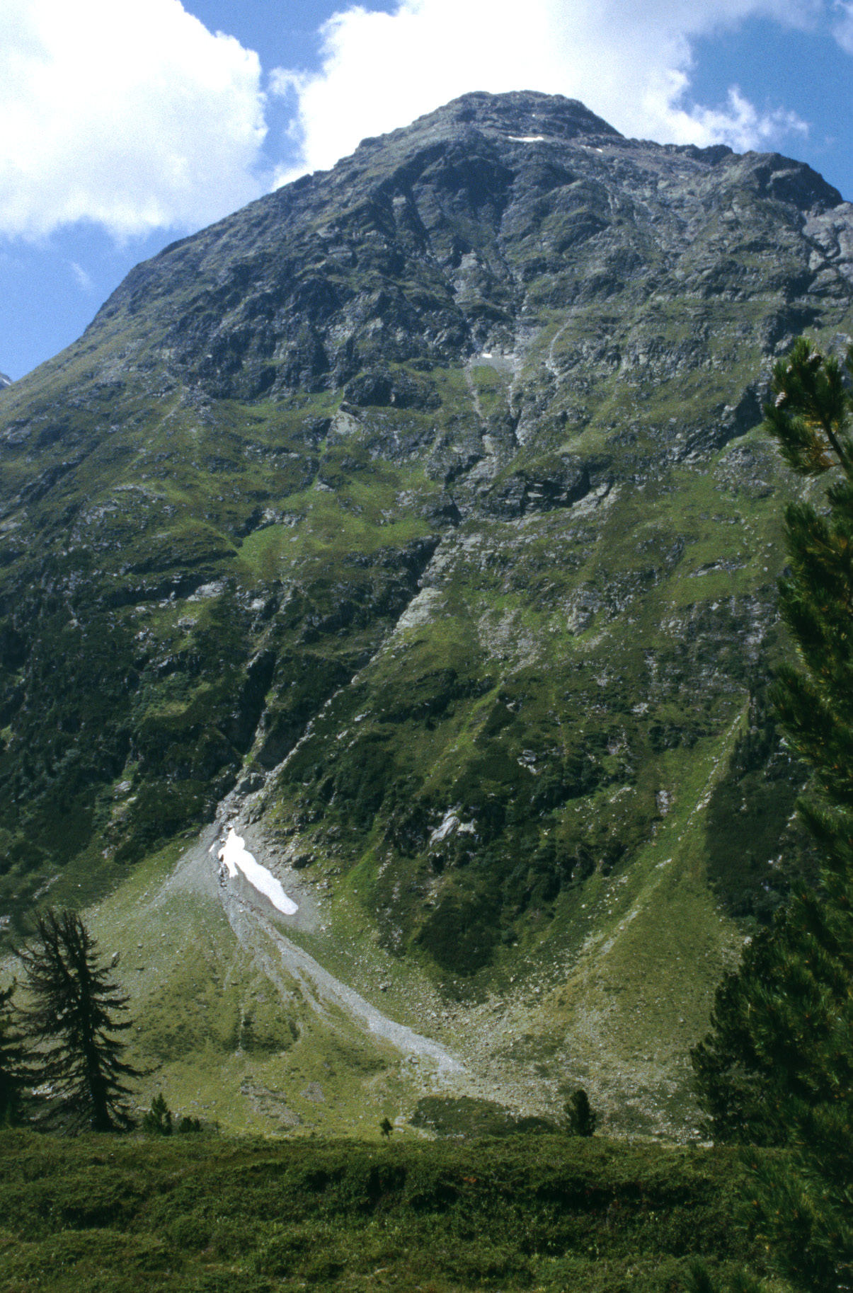 Fundusfeiler von Osten.